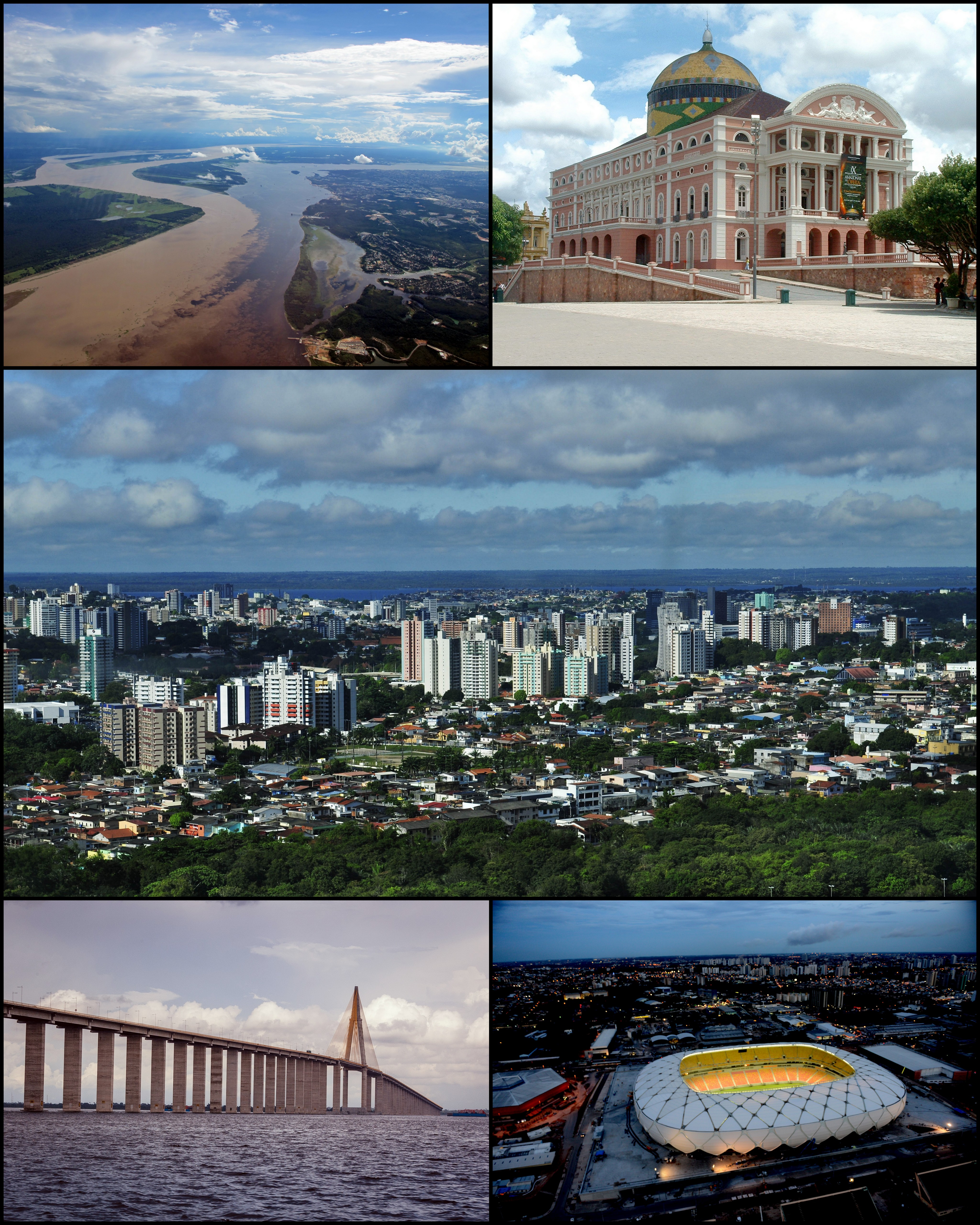 Montagem de Manaus